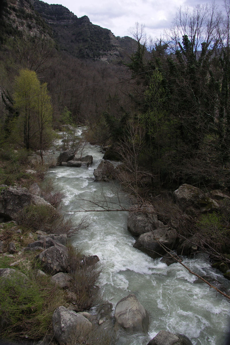 Fiume Vomano 17 aprile 2005